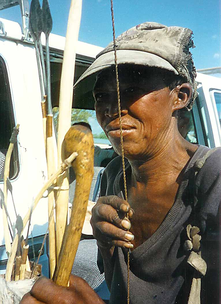 Namibien: Urawunner